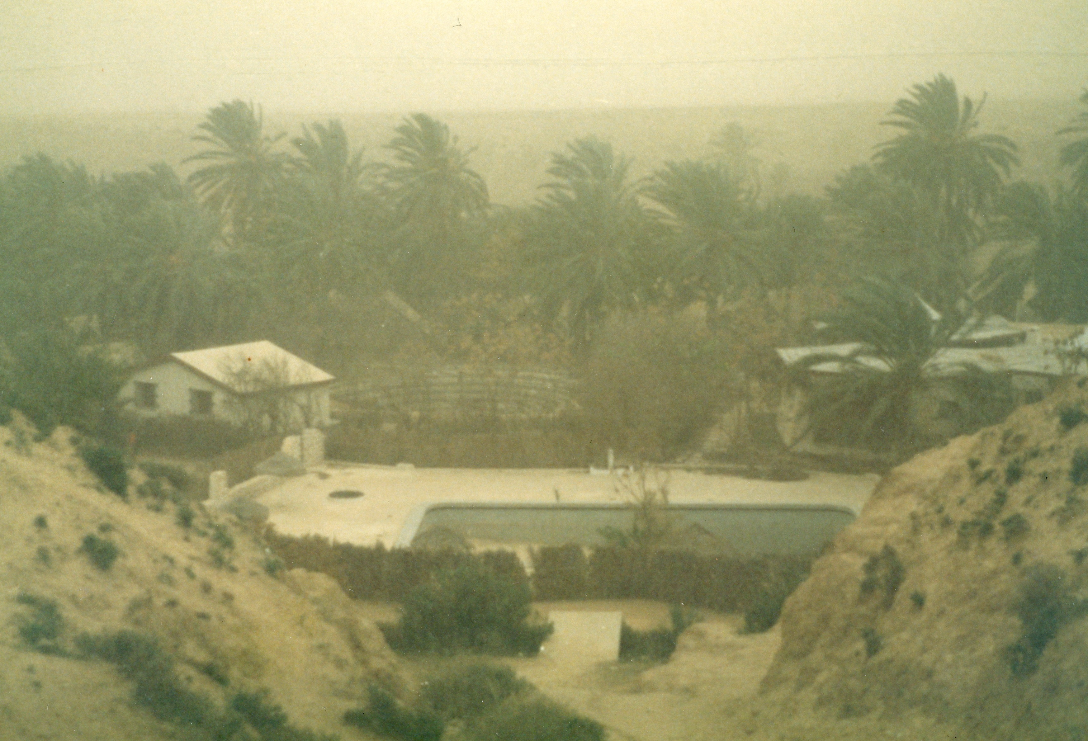 Sahara Desert, Kebili, Tunisia